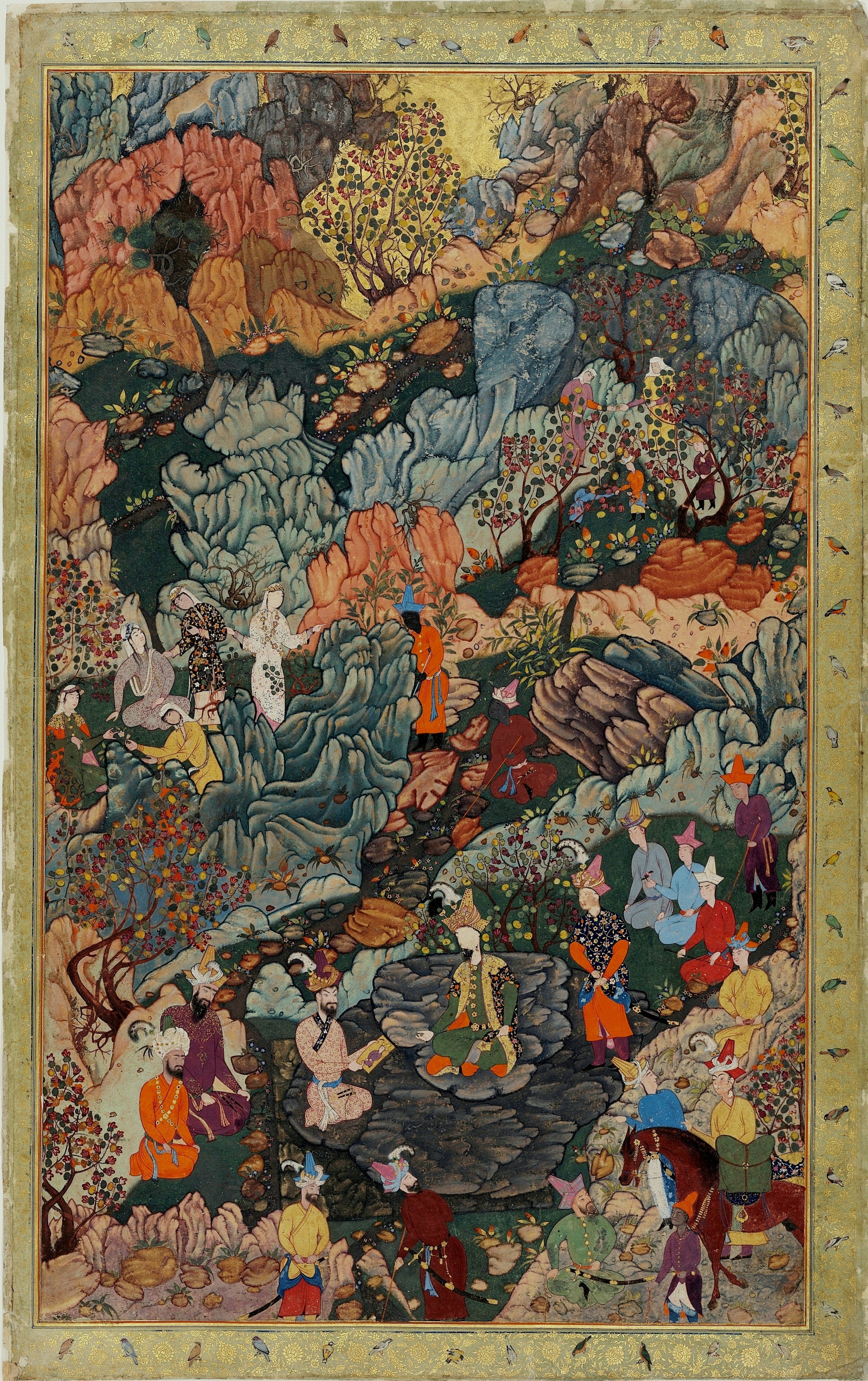 Дуст Мухаммад Император Хумаюн с братьями на фоне природы